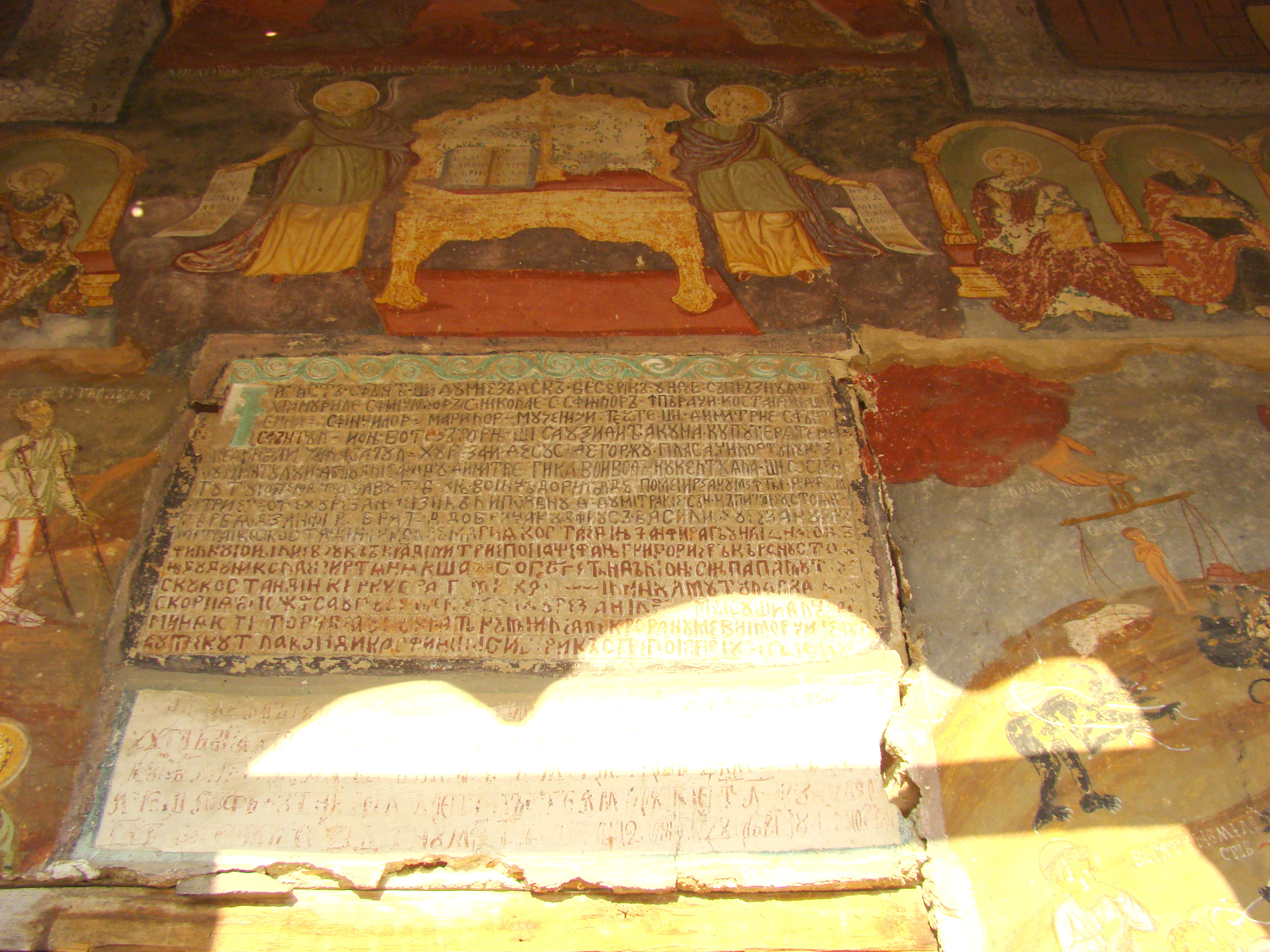 Biserica „Sf. Dumitru”, sat Hurezani; comuna Hurezani